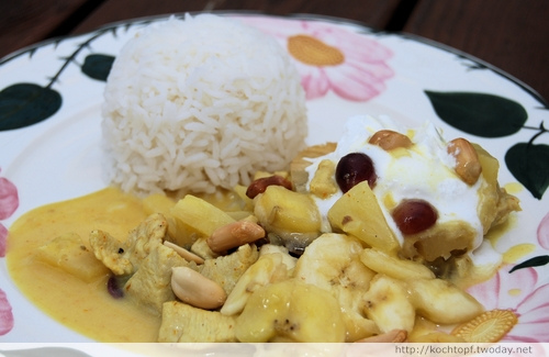 Riz Casimir, ein in der Schweiz weit verbreitetes Gericht